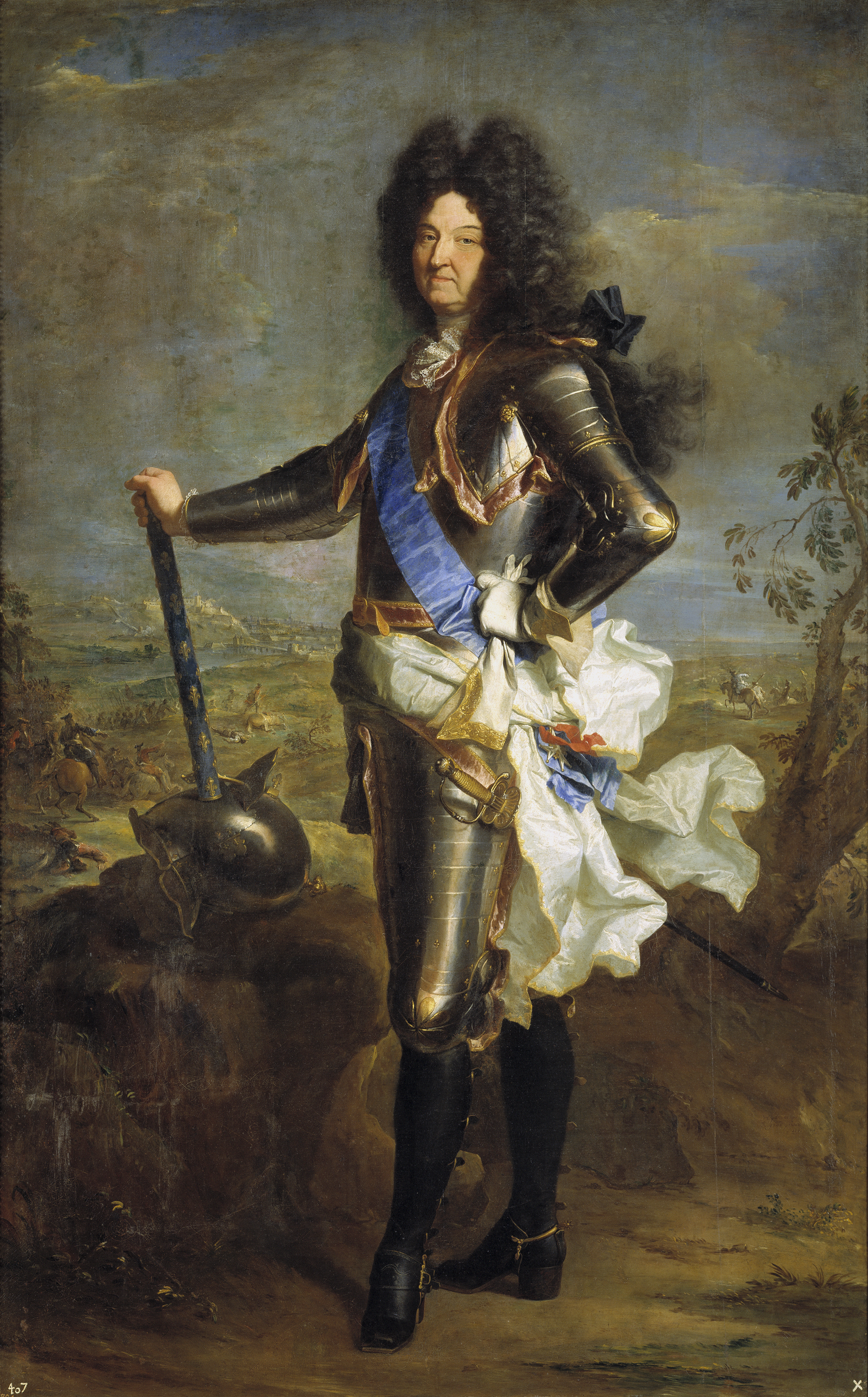 Retrato del rey Luis XIV de Francia (1638-1715), que fue hijo del rey Luis XIII de Francia y de la reina Ana de Austria.